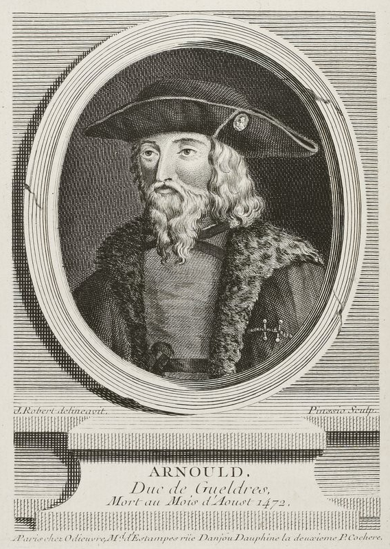 Portrait d'Arnold d'Egmont, dit aussi Arnold de Gueldre. Le nom sur ce portrait est écrit sous la forme germanique « Arnould ».